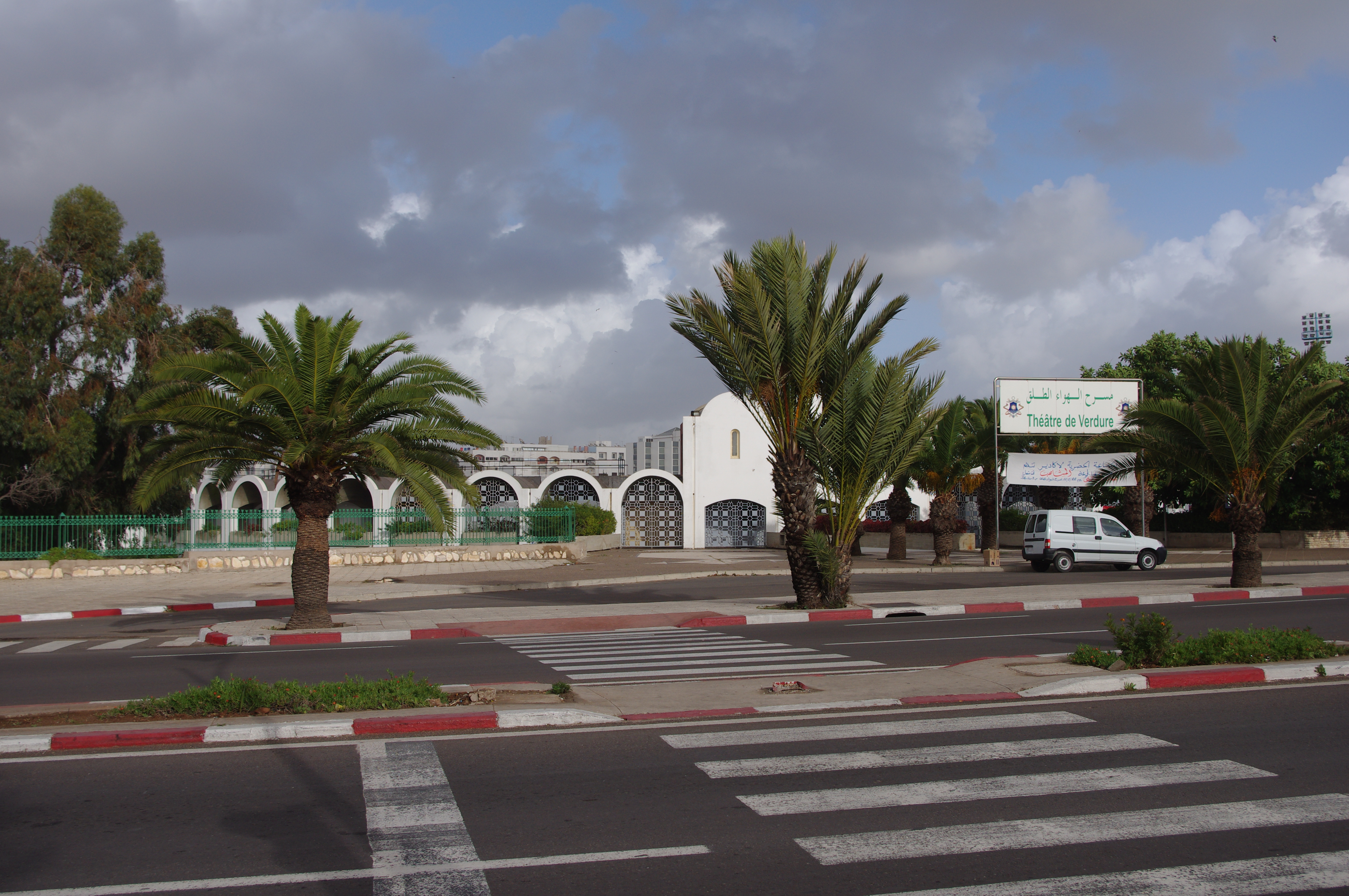 Theatre de Verdure, Agadir, Maroc